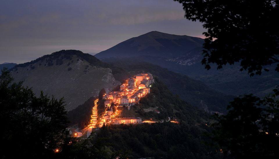 Veduta di Opi da Strada Forca d'Acero This is a photo of a monument which is part of cultural heritage of Italy.